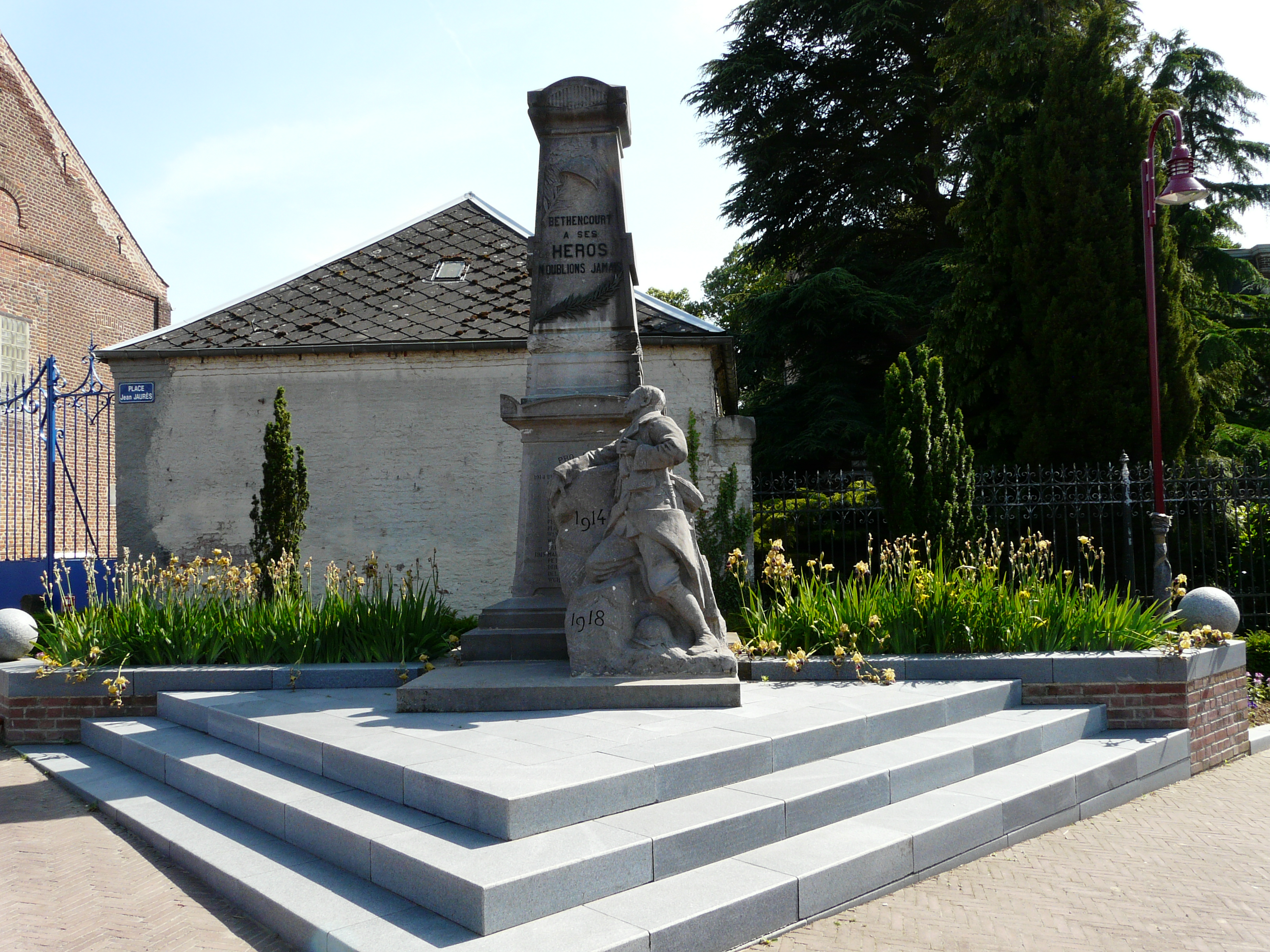 Monument aux morts de Béthencourt (Nord, France)